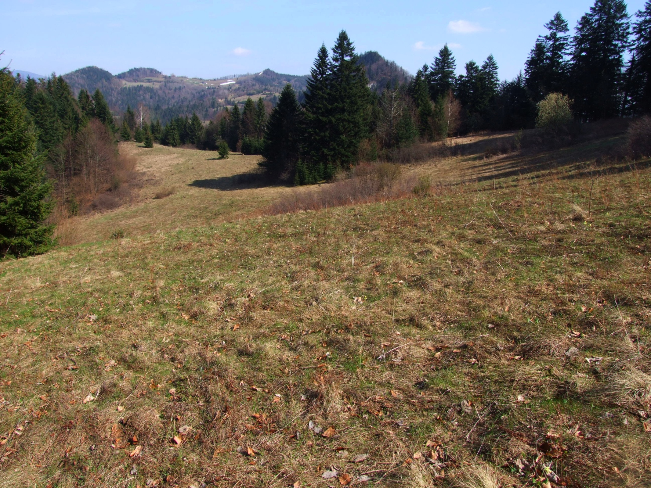 Polana Sosnów pod Sokolicą w Pieninach. W głębi, od lewej szczyty: Groń, Palenica, Szafranówka, Bystrzyk